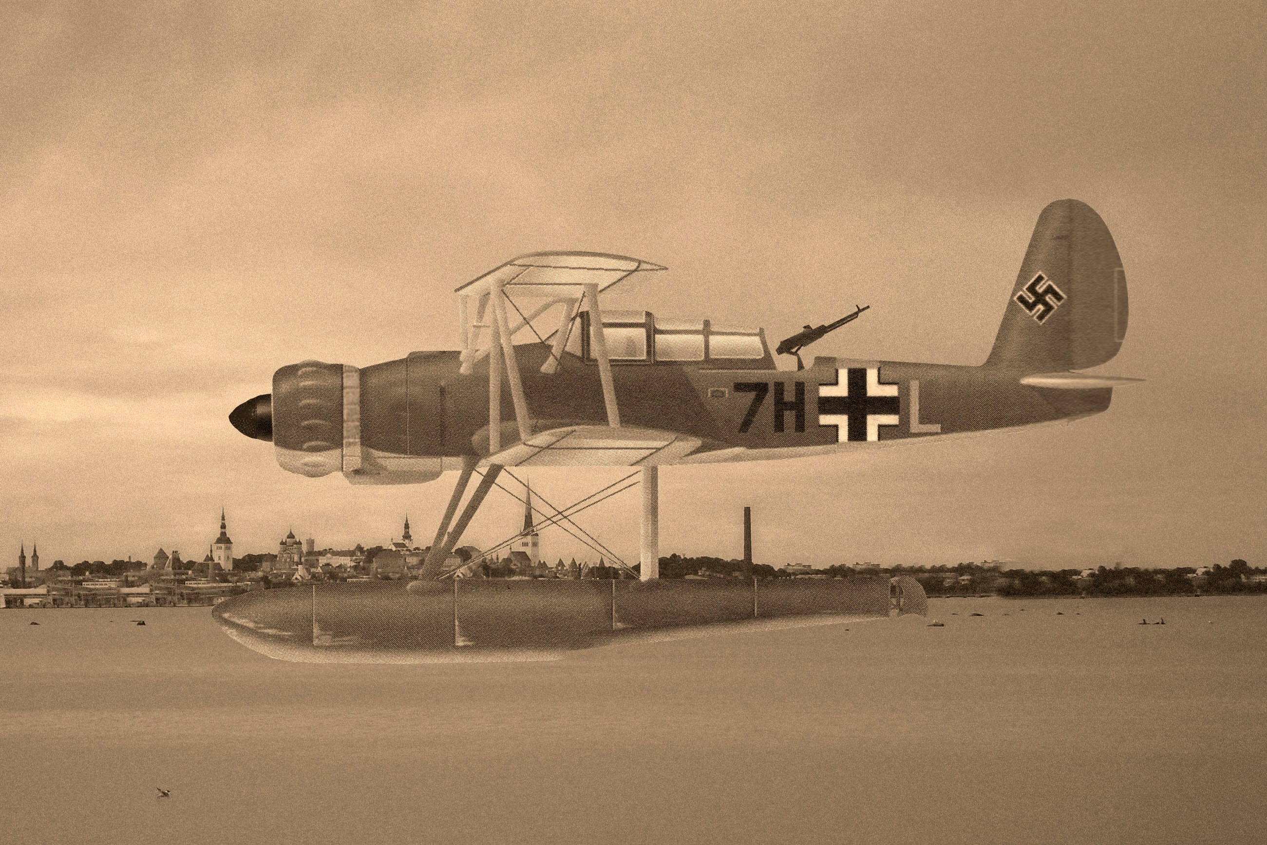 Ar 95 перед Таллином